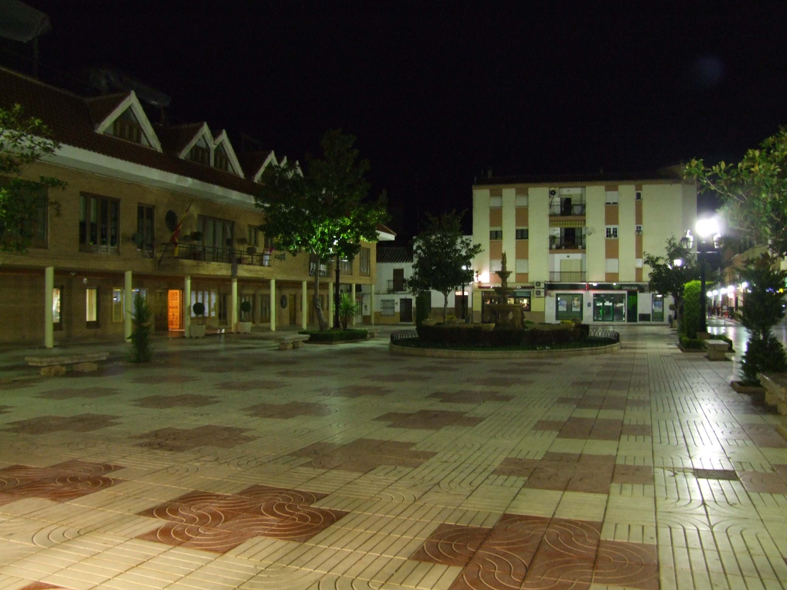 Ayuntamiento de Bolaños en Plaza España